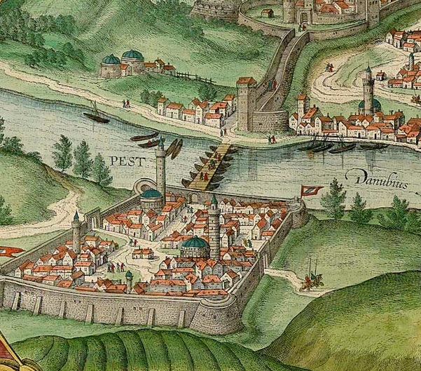 Pest 1616-ban, részlet Georg Hoefnagel képe alapján. Színesen megjelent Braun és Hogenberg Civitates Orbis Terrarum VI krónikájában 1617-ben.